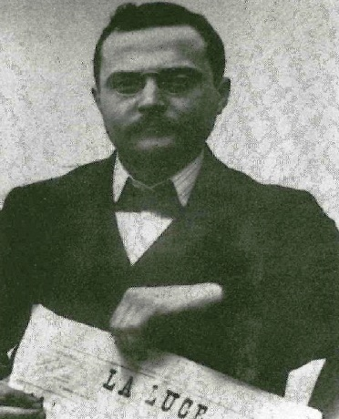 Vincenzo de Angelis con in mano uno dei giornali a cui collaborò: "La Luce"